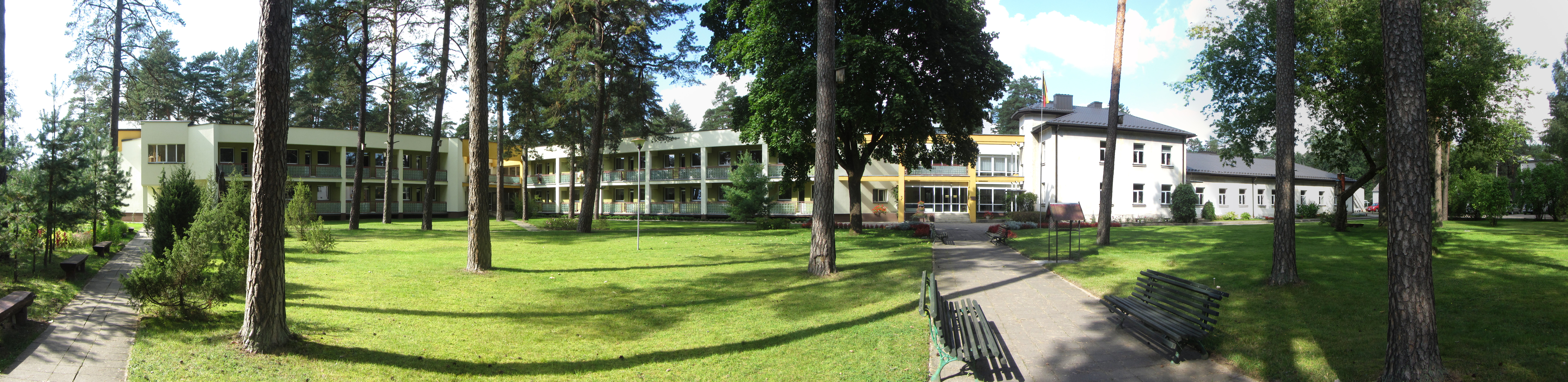 Naujieji Valkininkai, Lithuania